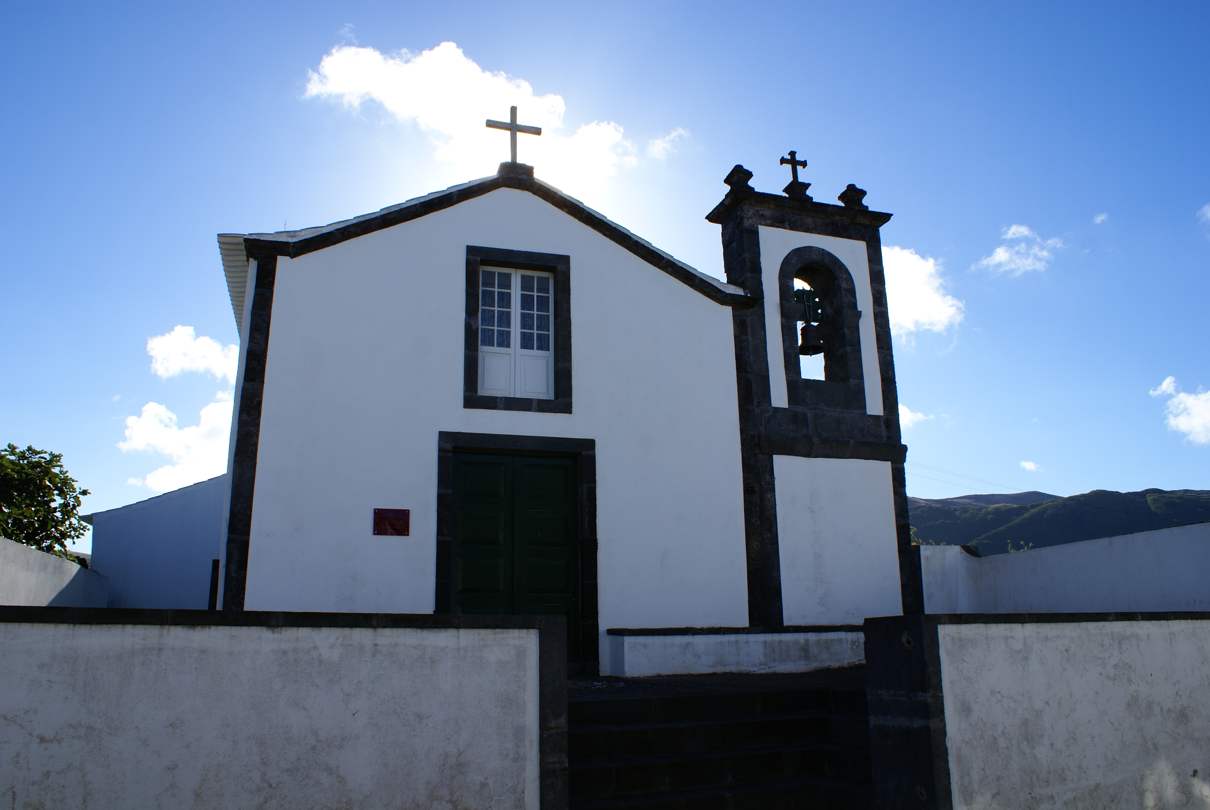 Ermida de Santo Antão, vila da Praia, ilha Graciosa, Açores, Portugal